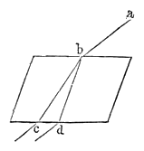 Doppelbrechung